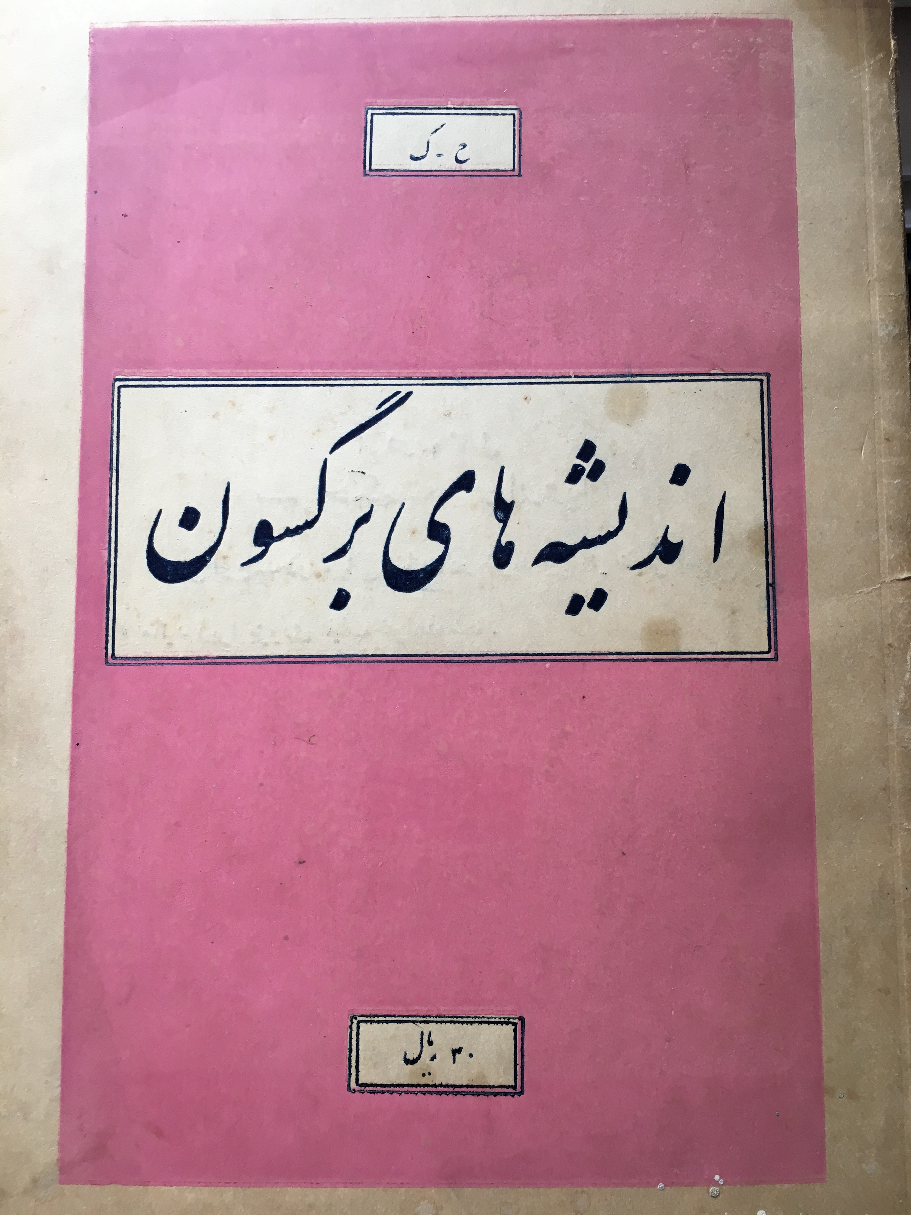 Traduction en persan de Bergson.